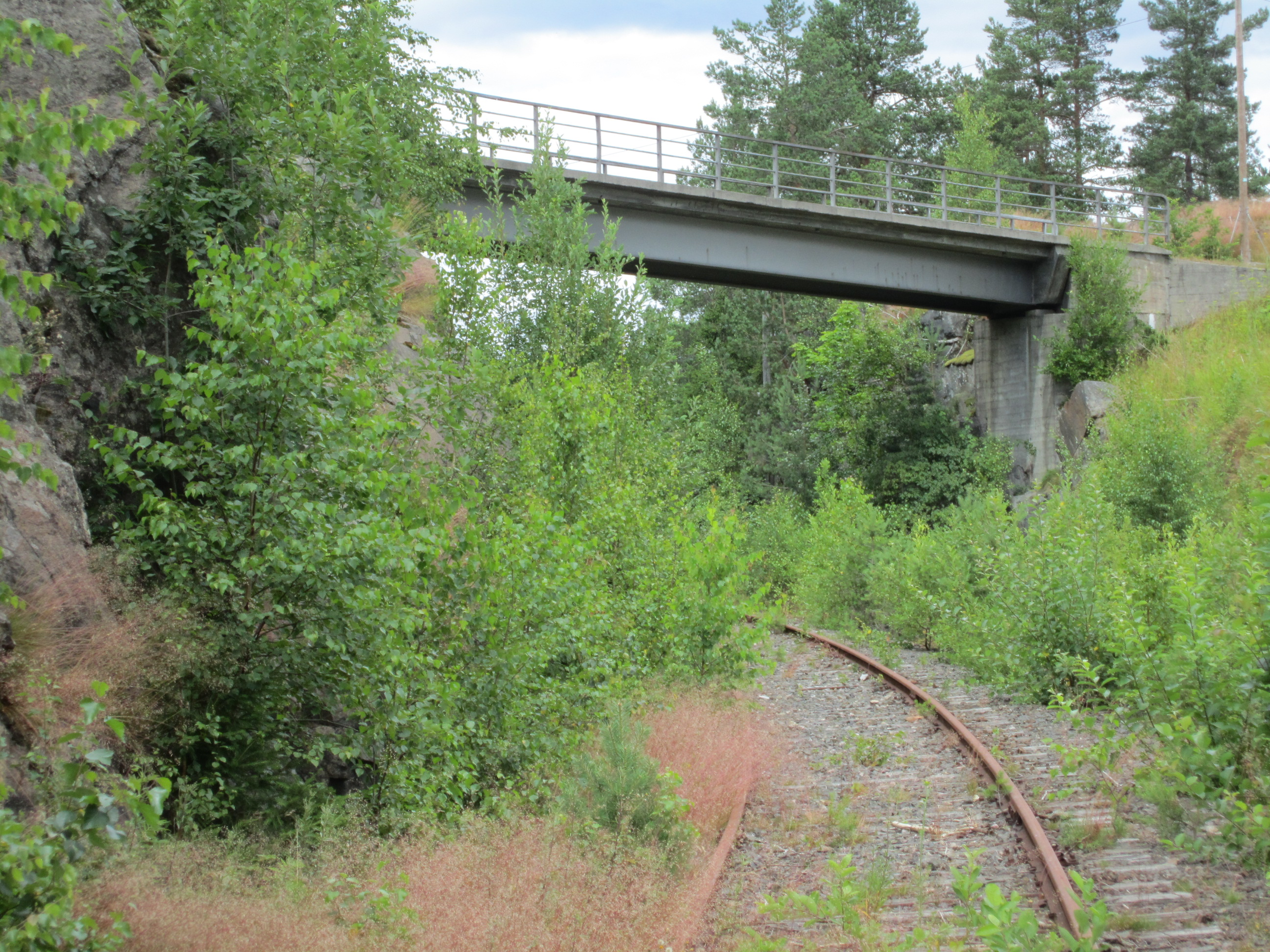 Fylkesvei 257 går på bro over den nedlagte Kragerølinjen.